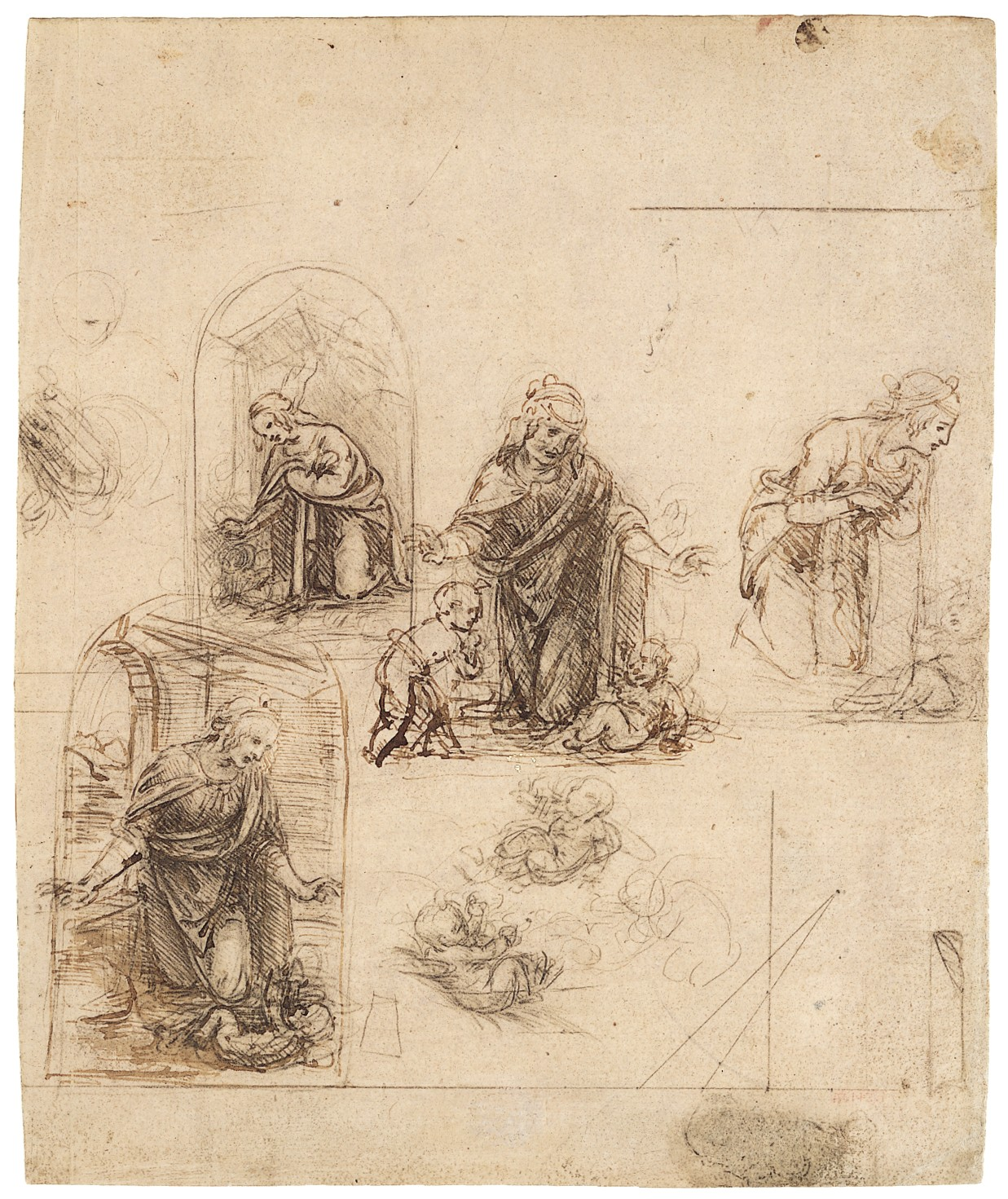 Drawing; Drawings